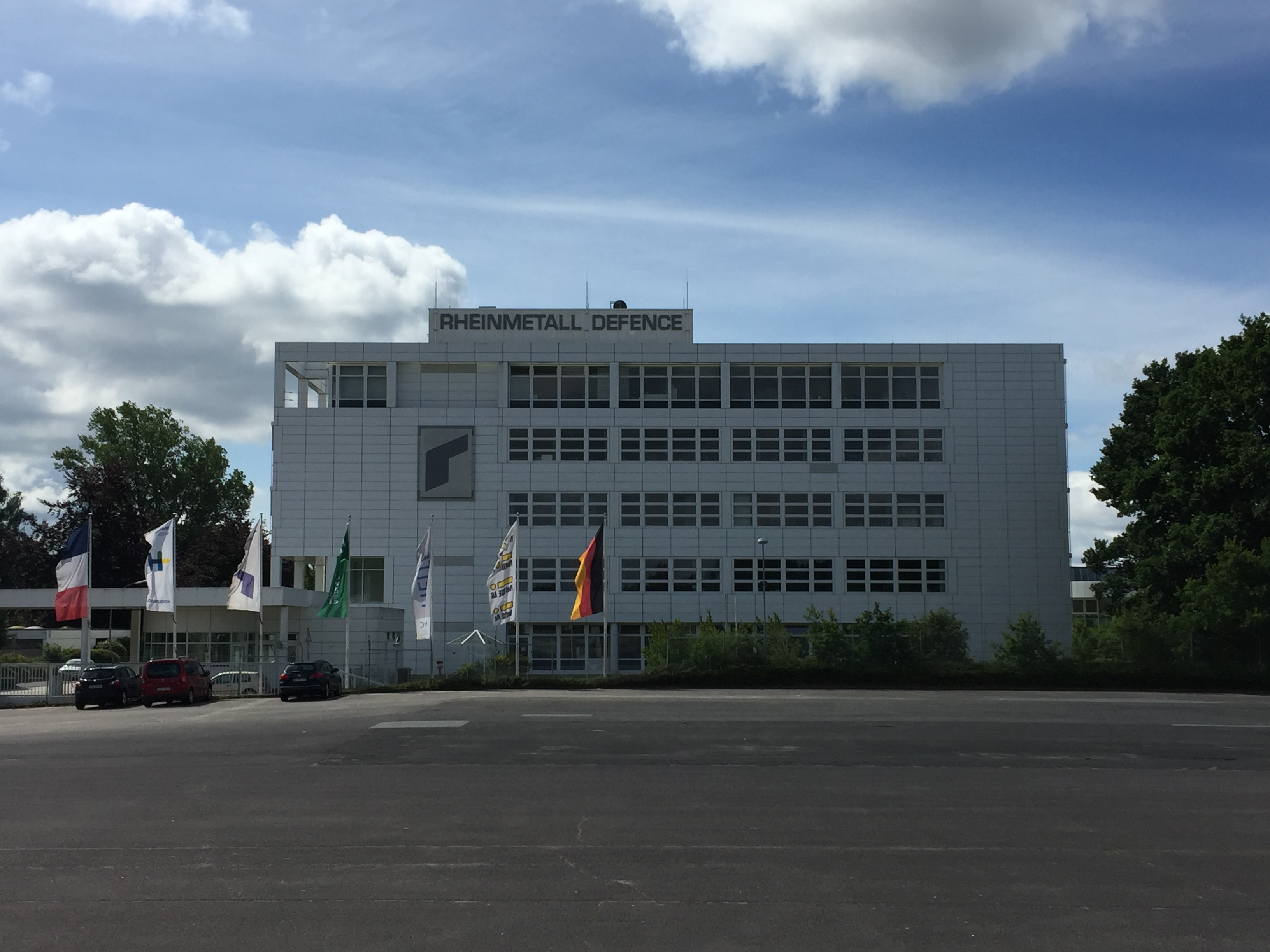 Rheinmetall Defence Niederlassung Kiel. Das Gebäude war ehemals Teil des Linotype-Hell-Werks in Kiel (später: Heidelberger Druckmaschinen).